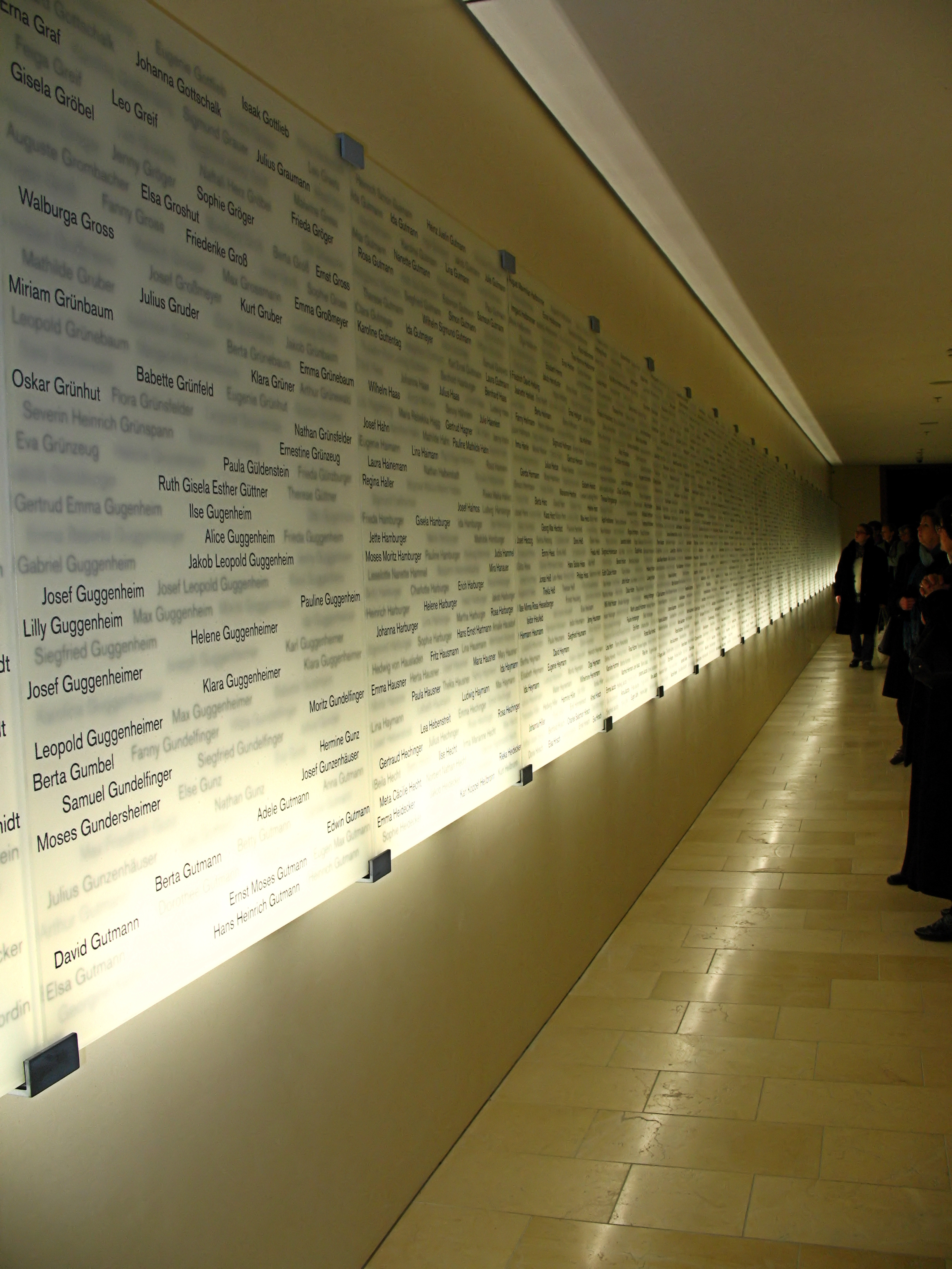 Deutschland, Bayern, München, Jüdisches Zentrum, Hauptsynagoge, "Gang der Erinnerung"